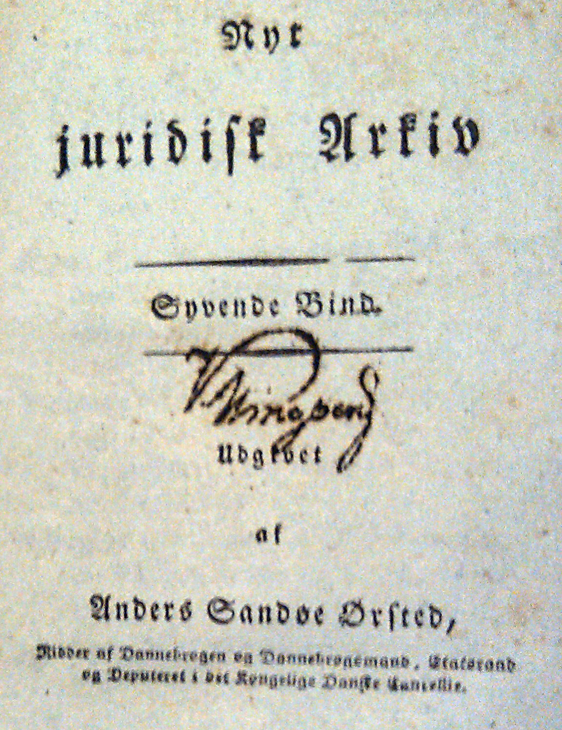 Christian Klingbergs personlige signatur på titelbladet til et bind af A.S. Ørsteds Nyt Juridisk Arkiv (7. Bind, 1814).